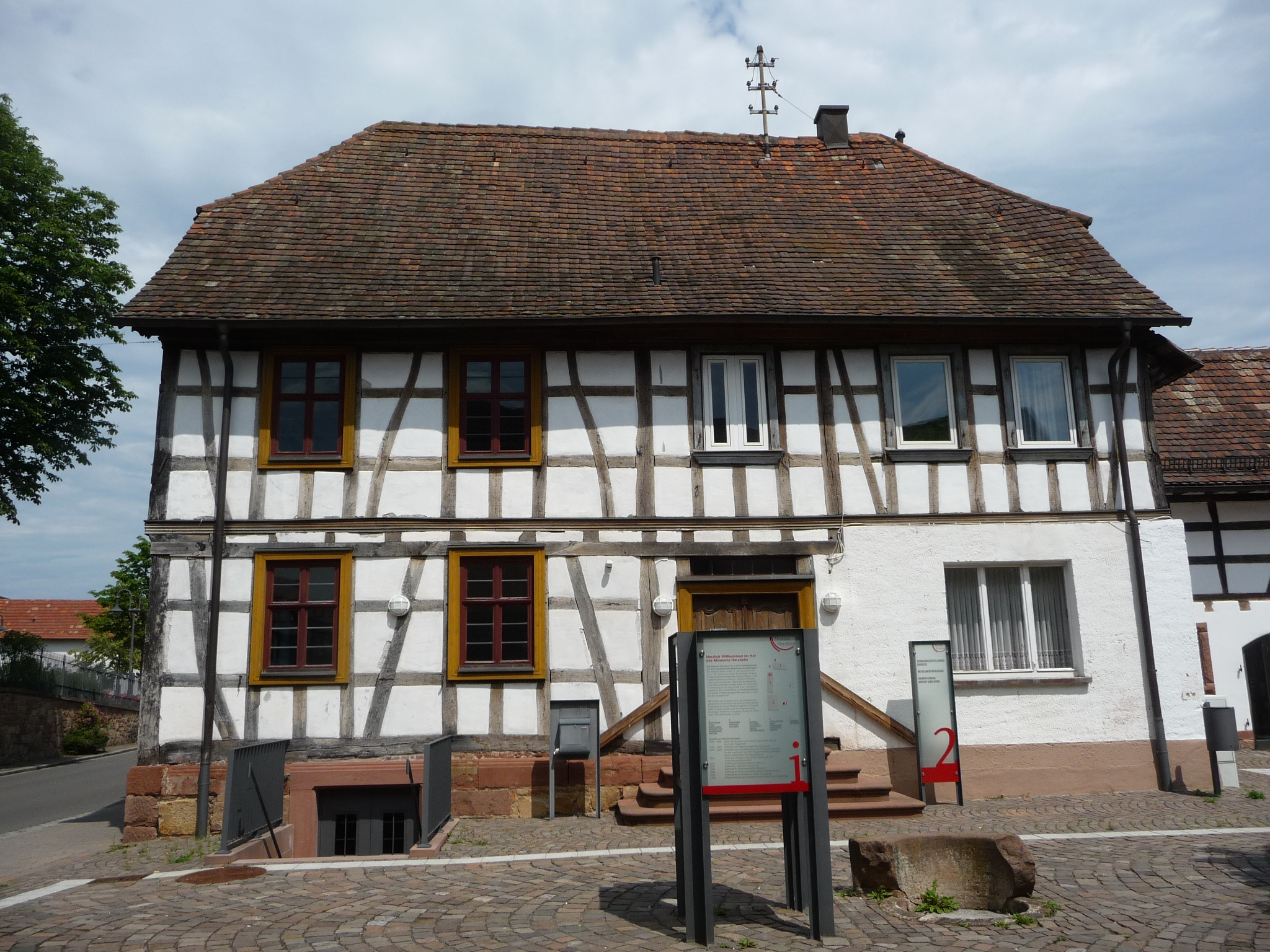 Heimatmuseum Untere Hauptstraße 153 in Herxheim; Herxheim bei Landau/Pfalz ist bezogen auf die Einwohnerzahl die größte Kommune im Landkreis Südliche Weinstraße.